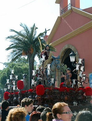 Borriquita de Chiclana